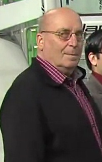 Ivo Daneu